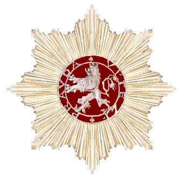 Ster